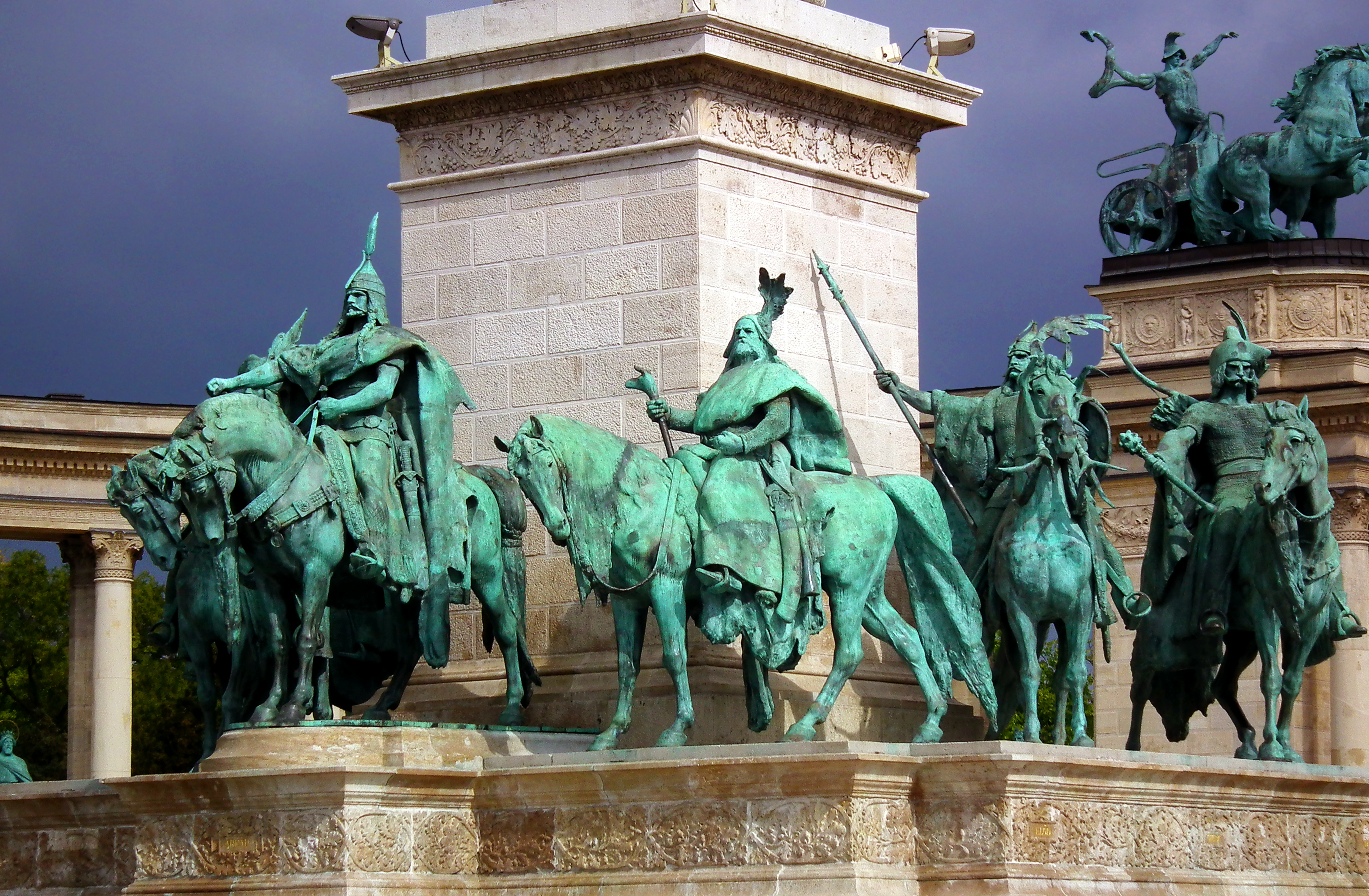 Millenniumi Emlékmű This is a photo of a monument in Hungary. Identifier: 1228